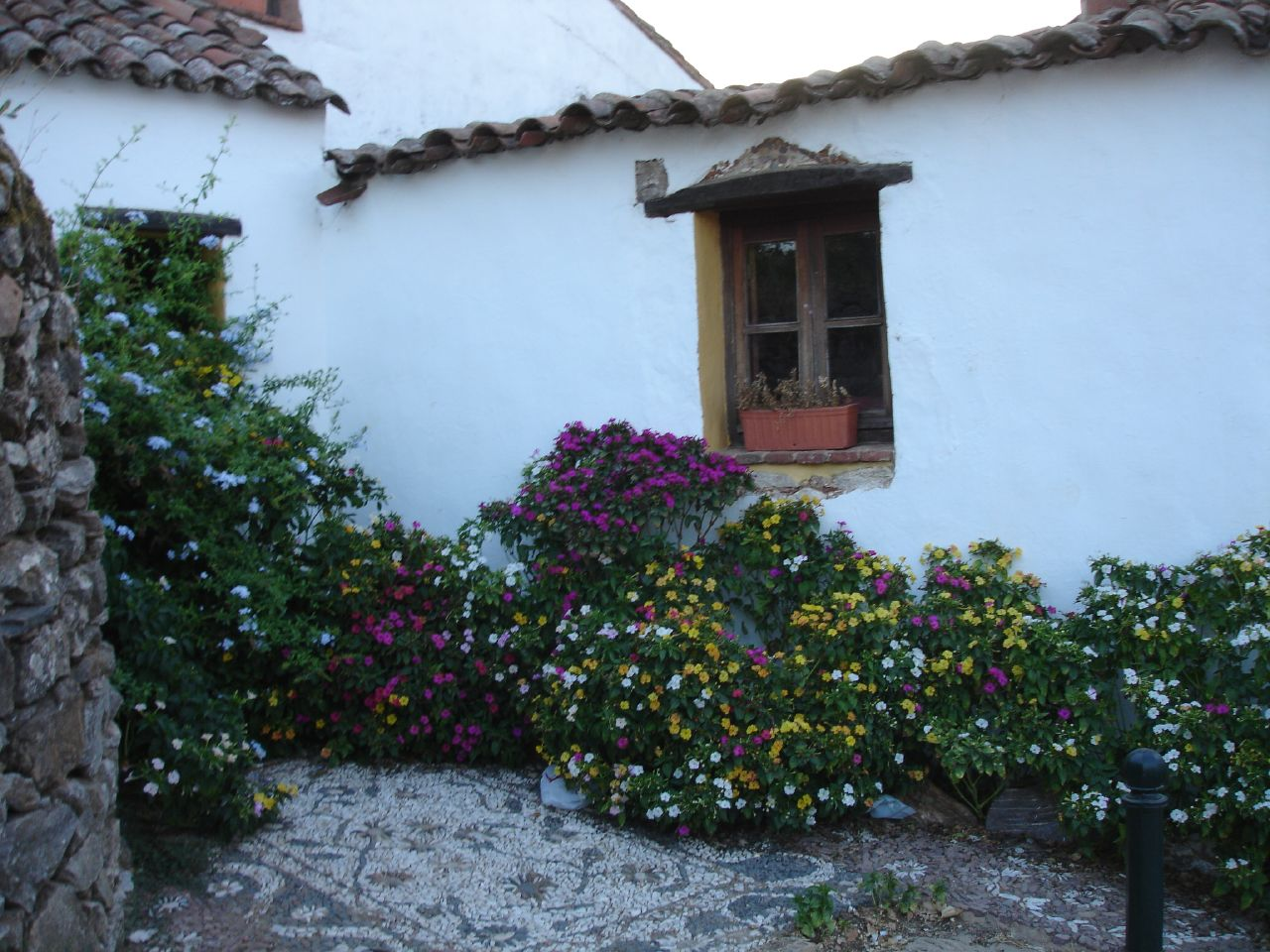 Calle de Aracena, Huelva, España